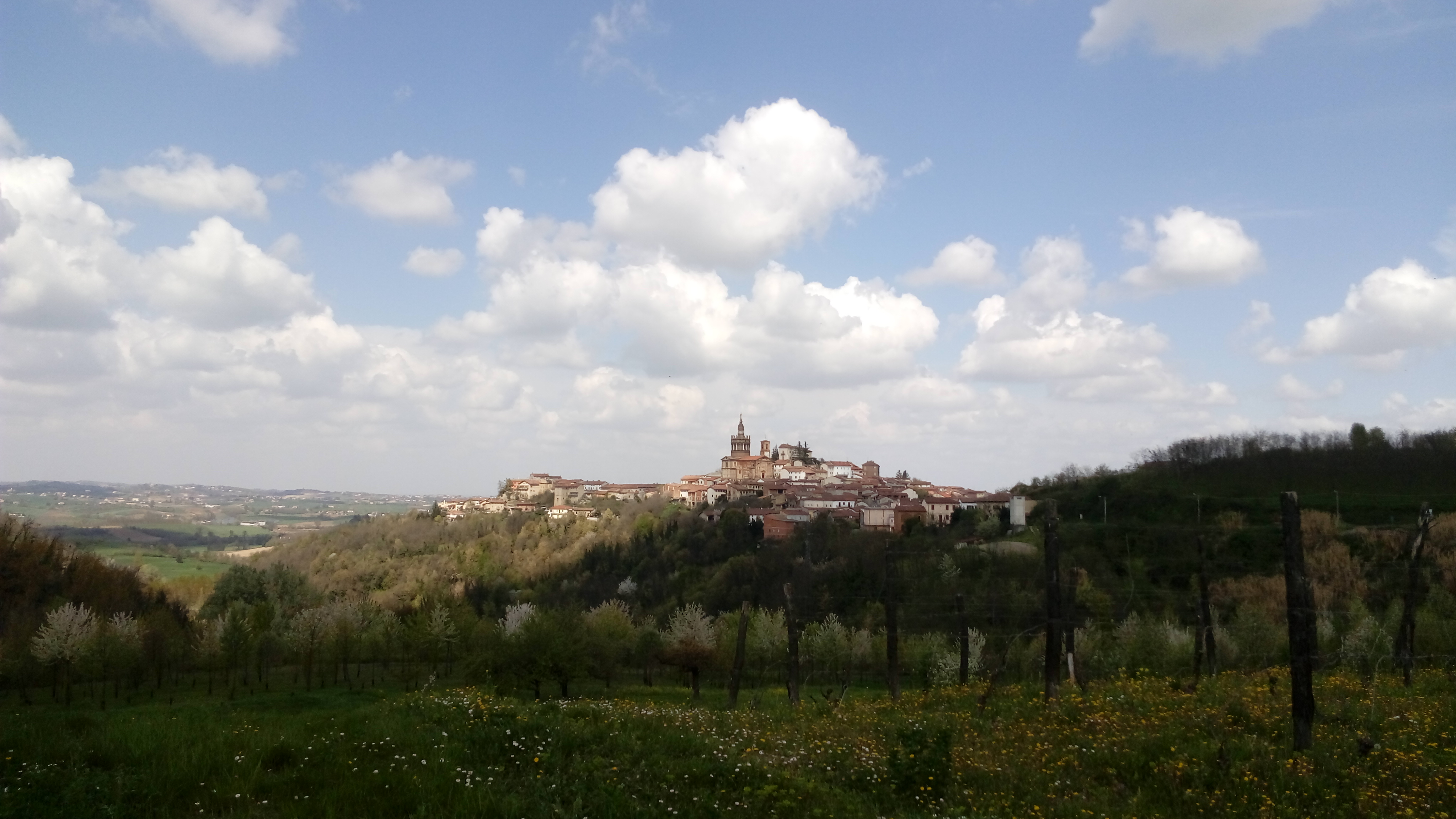 Comune di Camagna Monferrato (AL), Italia